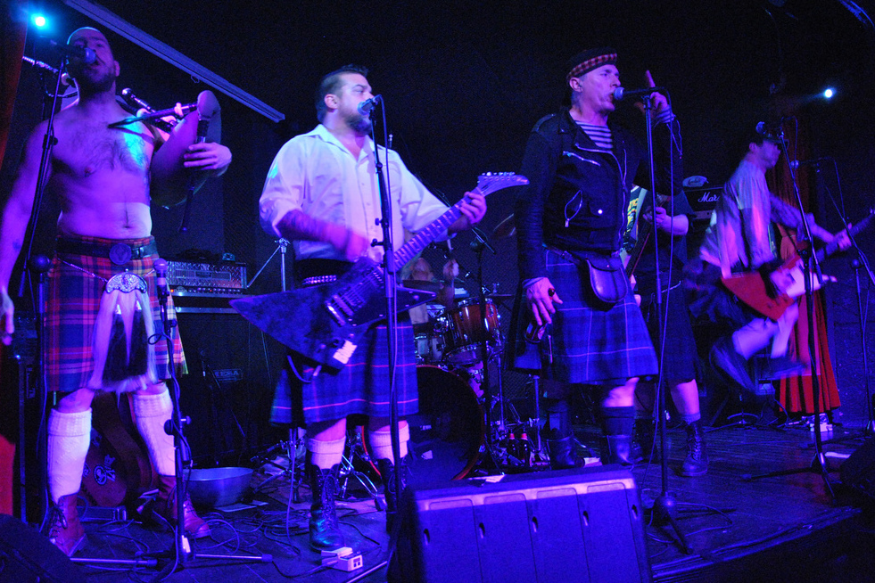 Concierto en sala López 04-01-2012